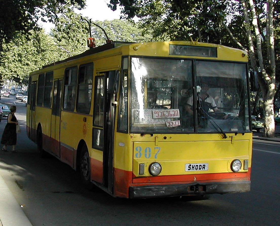 Skoda Trolleybus in Tbilisi, Georgia